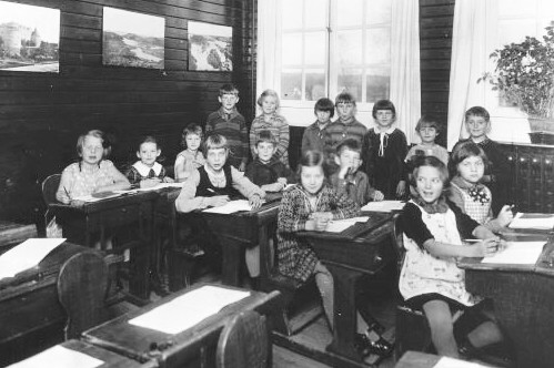 Storängens Samskola i Storängen. Andra och tredje klass. Bakifrån från vänster sitter Birgitta Jahn, Agneta Hubendick, Gudrun Holmgren, Ulla Purel, Anders Wallin, Anne Marie Widén, Ingmar Stockman, Veronica Pauli, Britta Stiebel. Stående från vänster Bengt Åkerblom, Inga Wallin, Barbro Rydman, Åke Olson, Karin Ljunggren, Vera Hanner, Ingvar Stiebel.